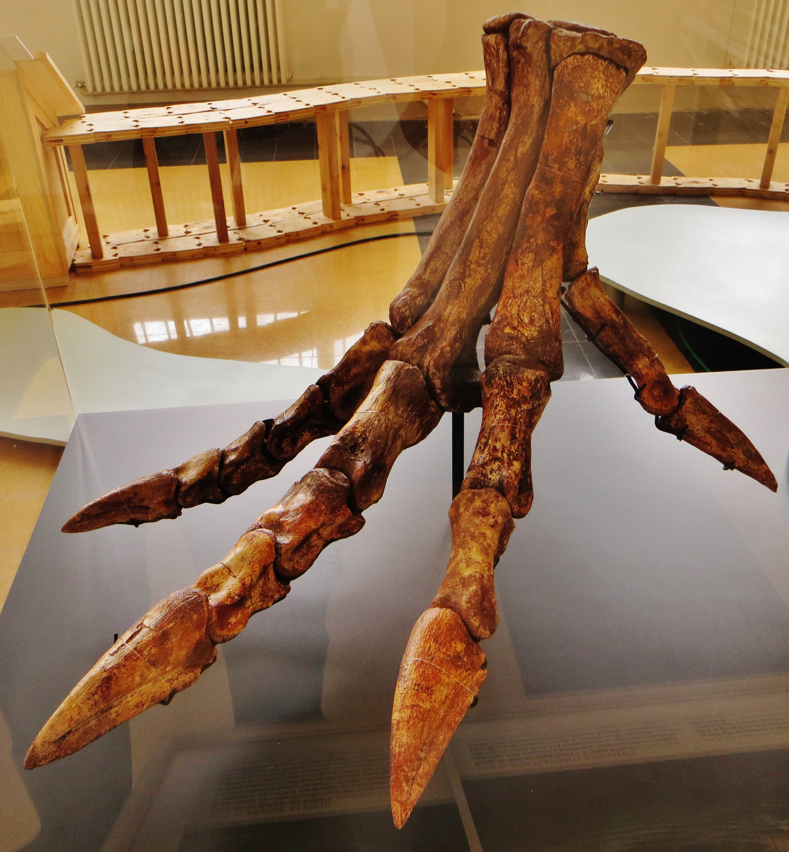 Fossil - Took the picture at Palazzo Dugnani, Milano